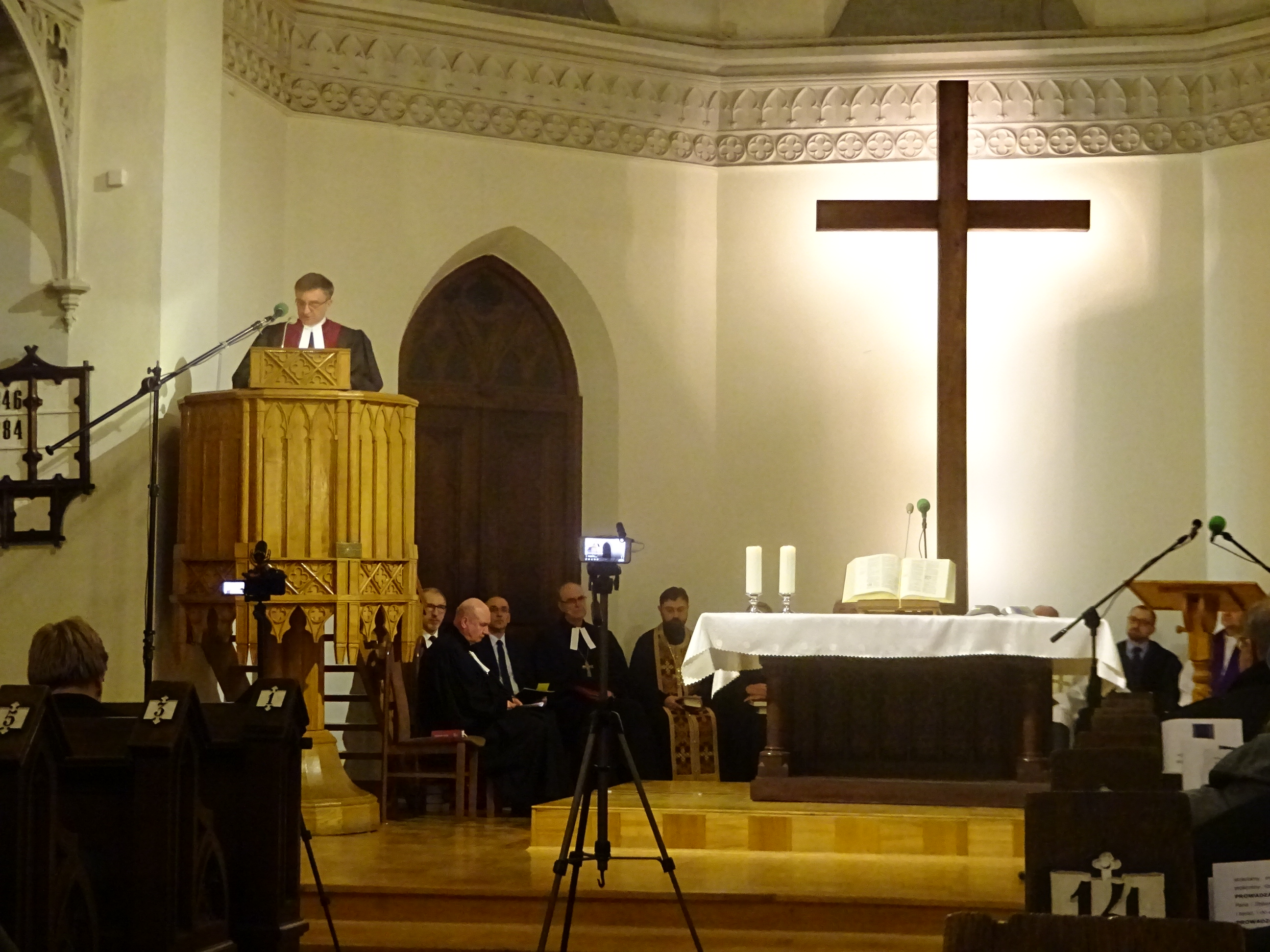 uroczystość z okazji ukończenia Biblii Ekumenicznej w Kościele Reformowanym przy Al. Solidarności